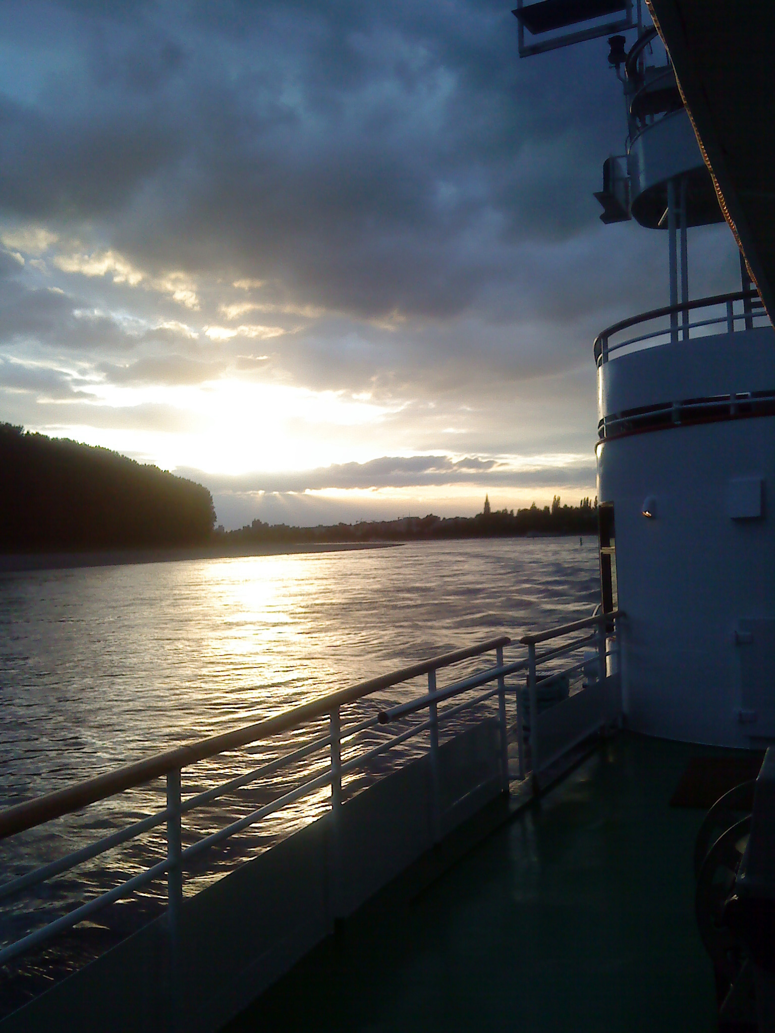 Die Goethe auf planmässiger Abendfahrt mit Blick auf Köln-Porz